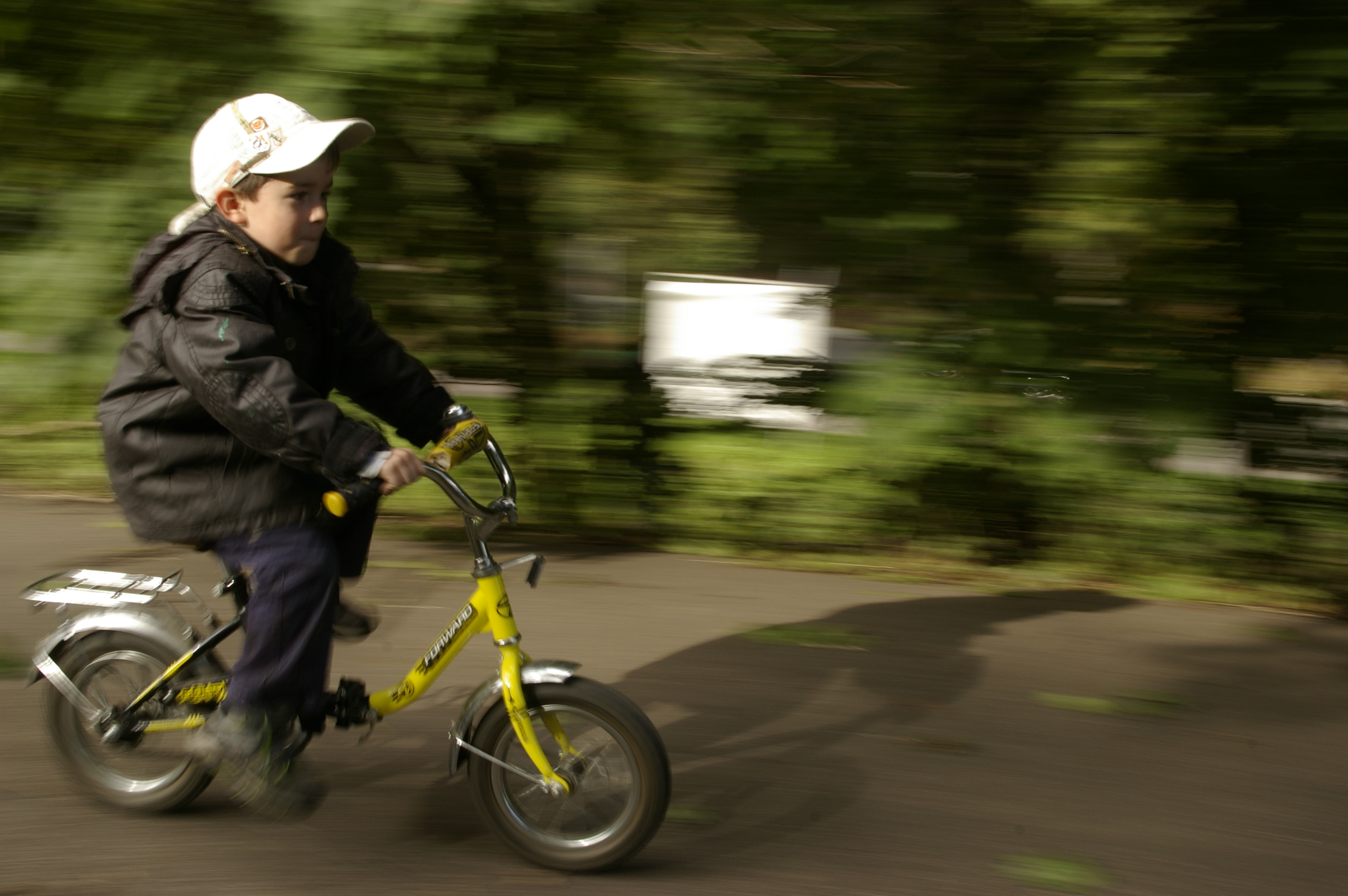 Движение мальчика на велосипеде